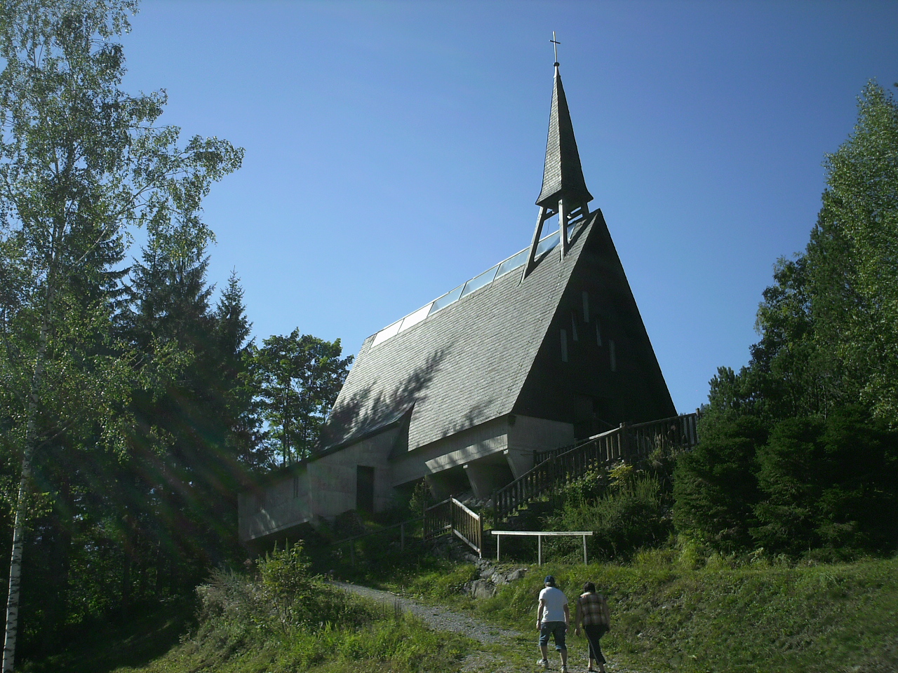 Kath. Filialkirche hl. Josef in Gollrad-Gußwerk/Österreich.